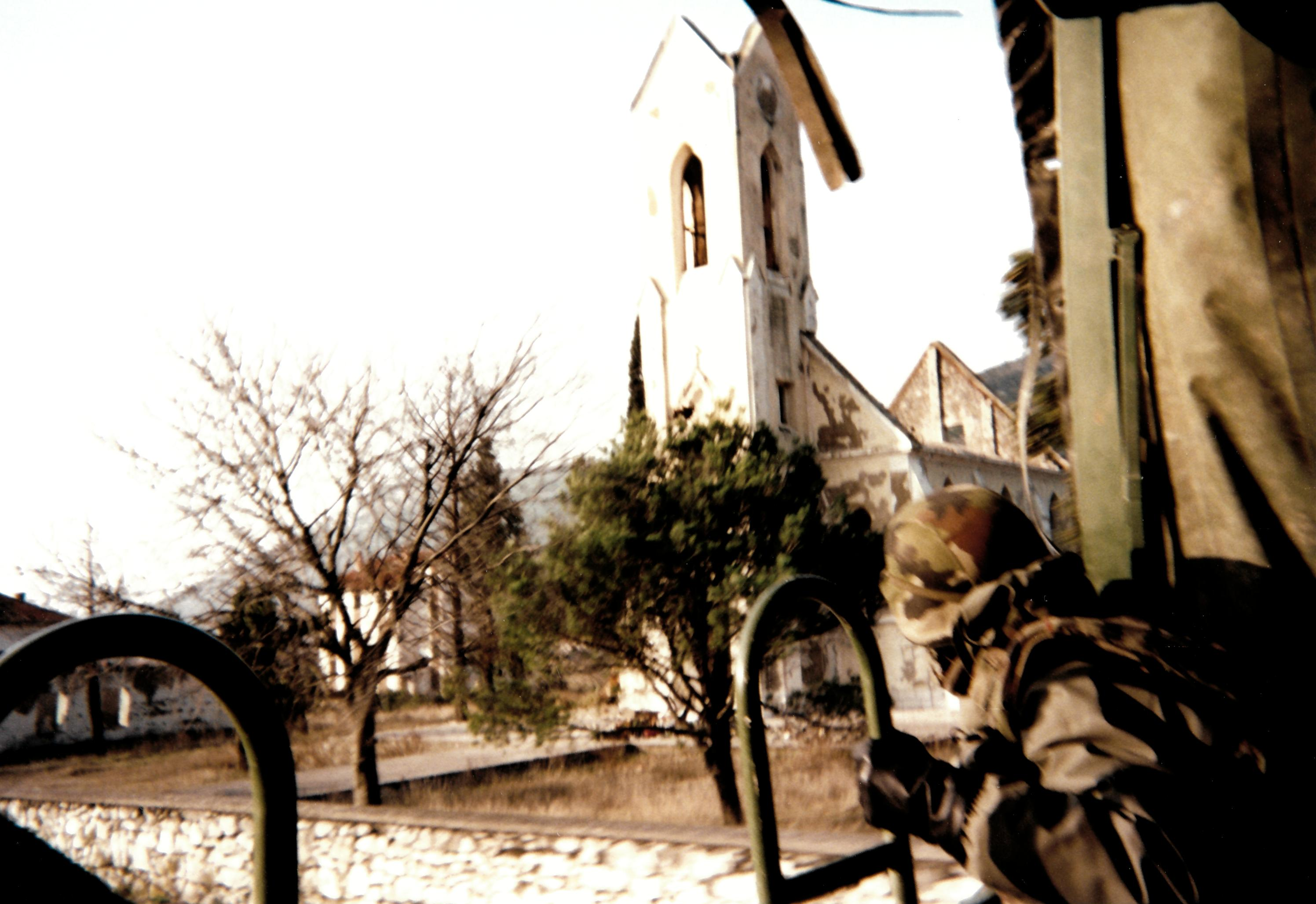 En partant vers notre nouveau camp, nous empruntons la route Mostar-Sarajevo et passons non loin de notre camp initial dans un village partiellement détruit. Ici c'est une église mais ailleur ce sont des mosquées que j'ai vu détruites.